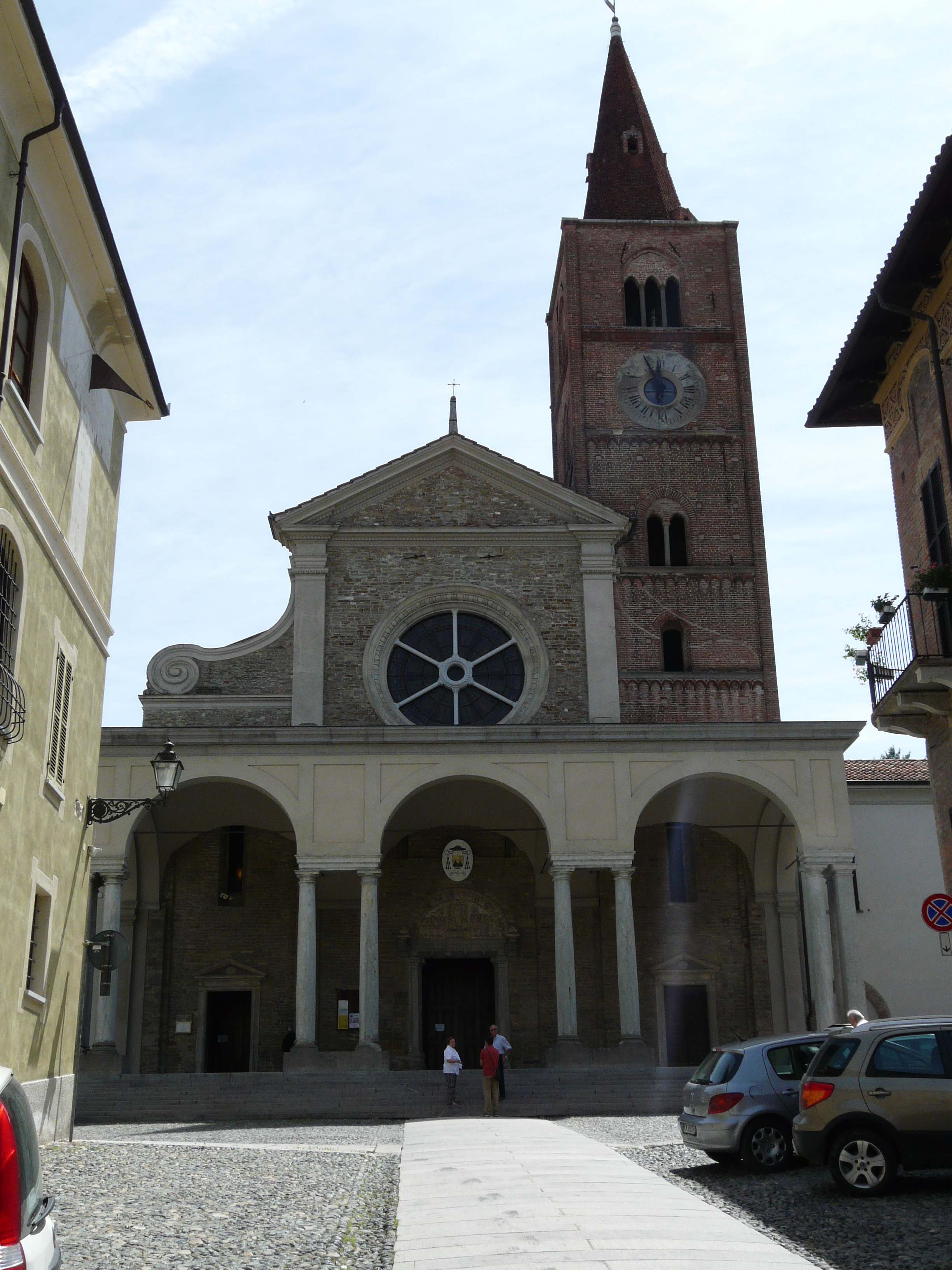 Cattedrale di Acqui Terme, Piemonte, Italia